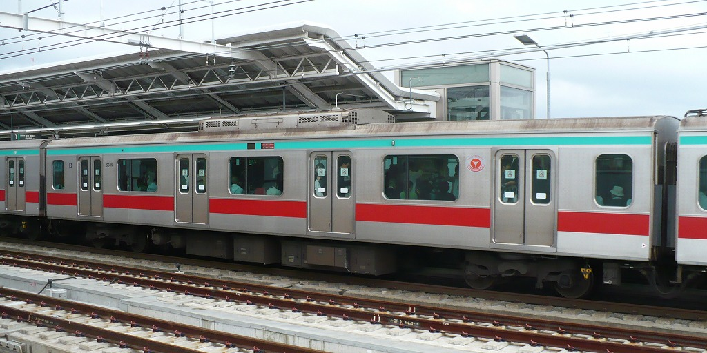 東急5000系中間車両